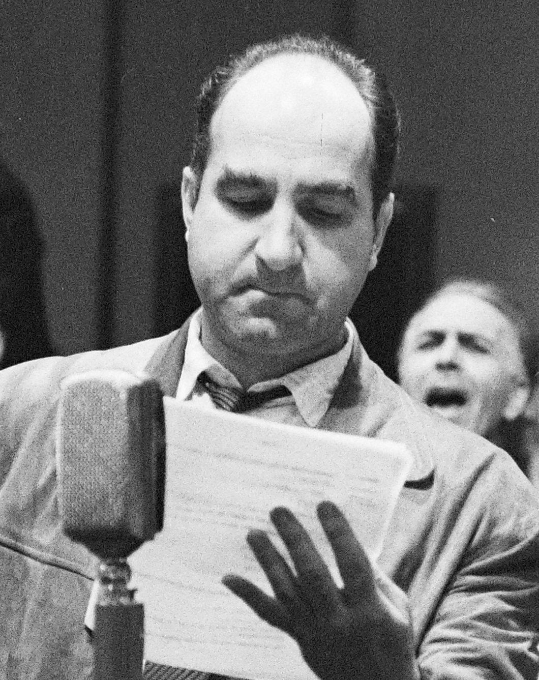 Melis György Kossuth- és háromszoros Liszt Ferenc-díjas magyar operaénekes (bariton), érdemes és kiváló művész, a Halhatatlanok Társulatának örökös tagja.